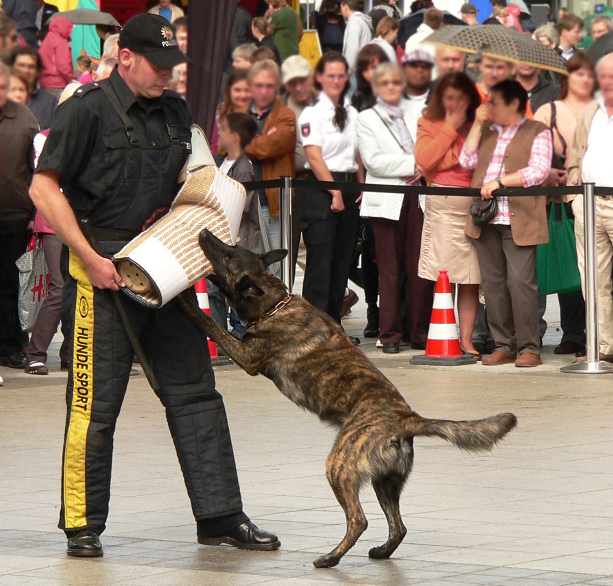 Vorführung Polizeihunde, Fotoaufnahme bei Veranstaltung "Polizei erleben" am 04./05.09.10 in Hannover auf dem Ernst-August-Platz